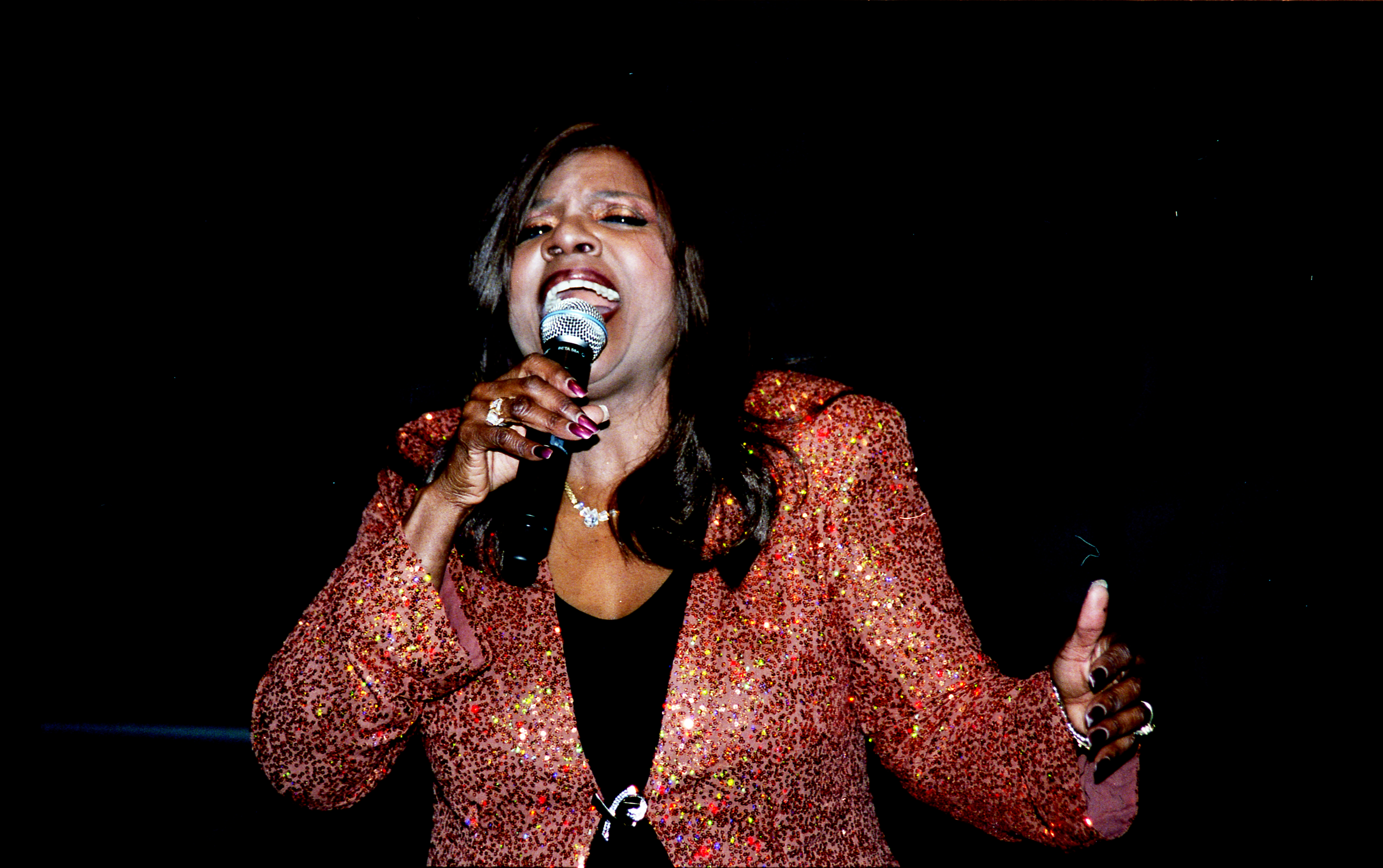 THE QUEEN OF DANCE MUSIC IN ONE EXCLUSIVE PORTRAIT PHOTO BY GIORGIO ERRIQUEZ